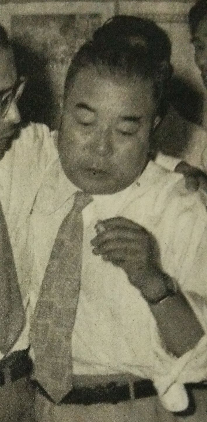 田中彰治